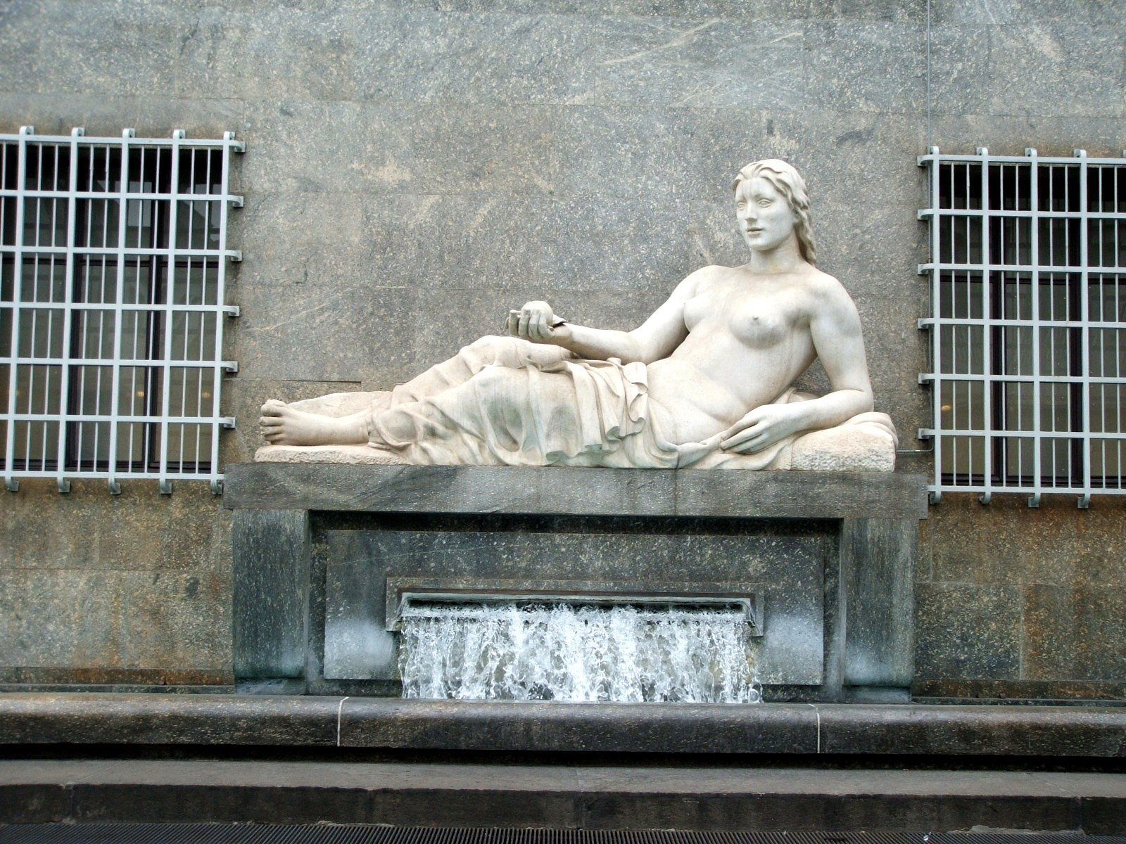 Statua raffigurante il fiume Dora Riparia, piazza CLN, Torino (Piemonte, Italia)